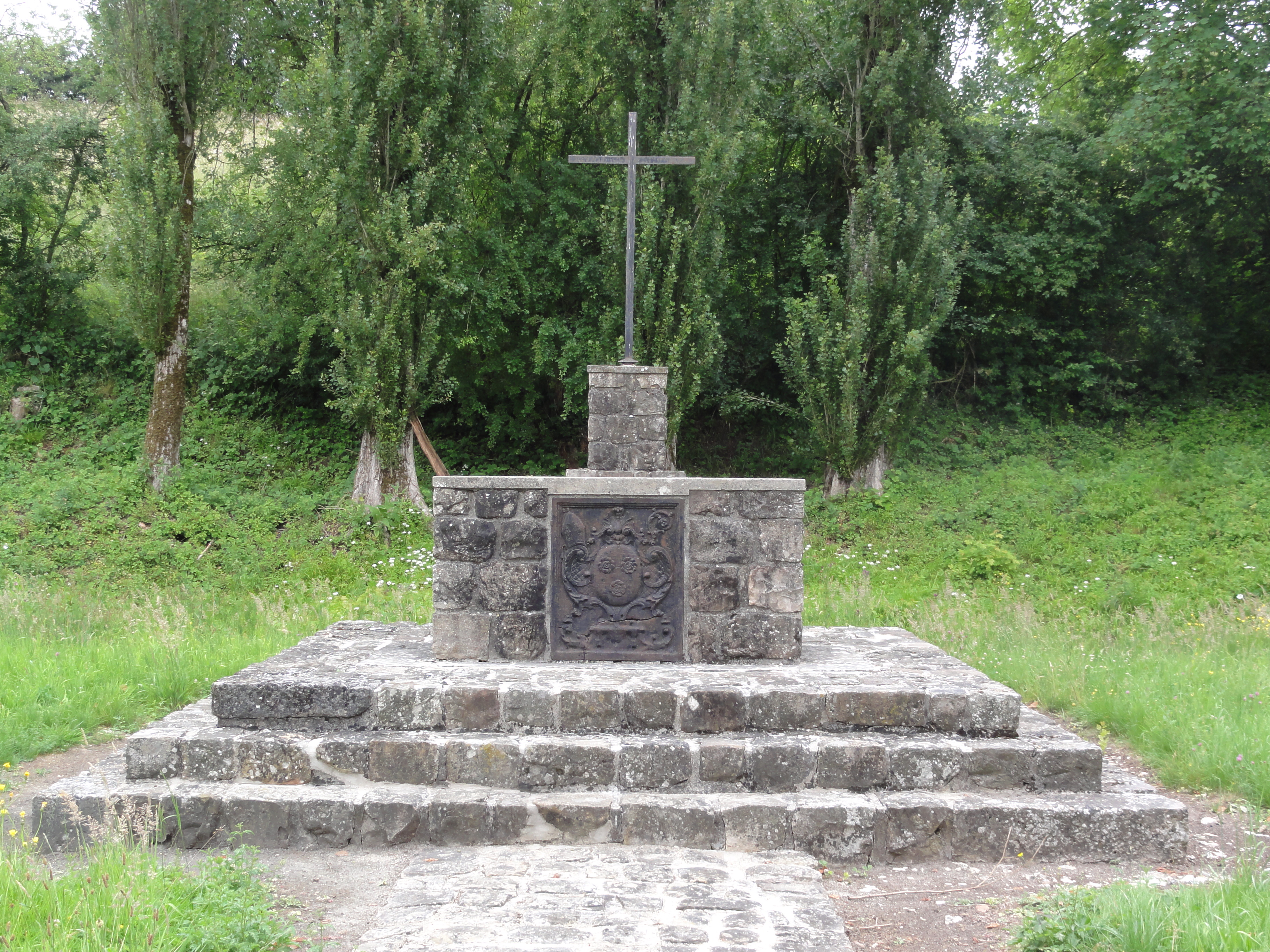 La Bouteille (Aisne), au lieu-dit de Floigny, en souvenir de l'abbaye de Floigny